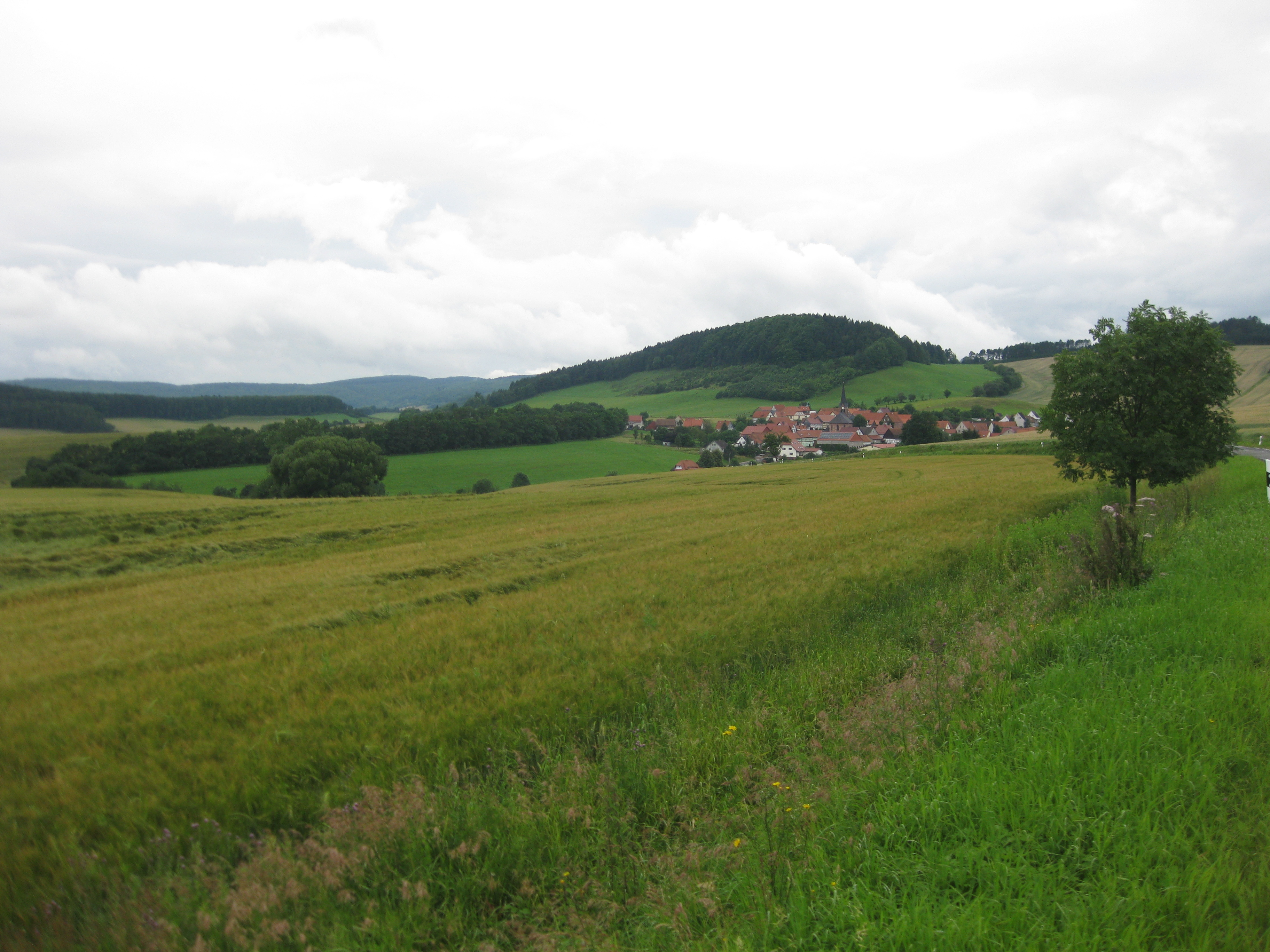 Krombach im Südeichsfeld unterhalb des Hühneberges